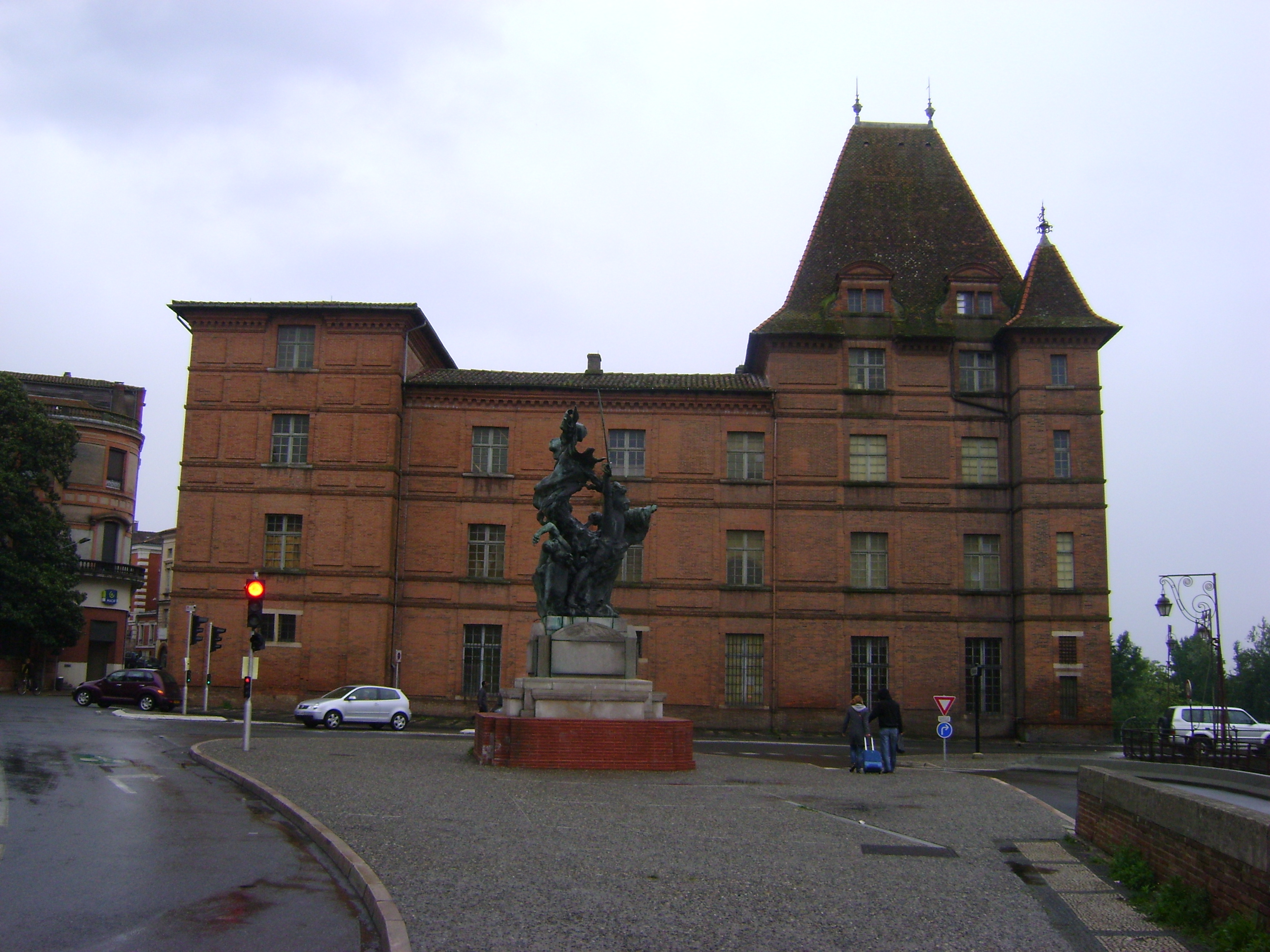 Musée Ingres, Montauban, Tarn-et-Garonne. Ancien palais épiscopal, ancien Hôtel de Ville. Facade Ouest du Musée. .